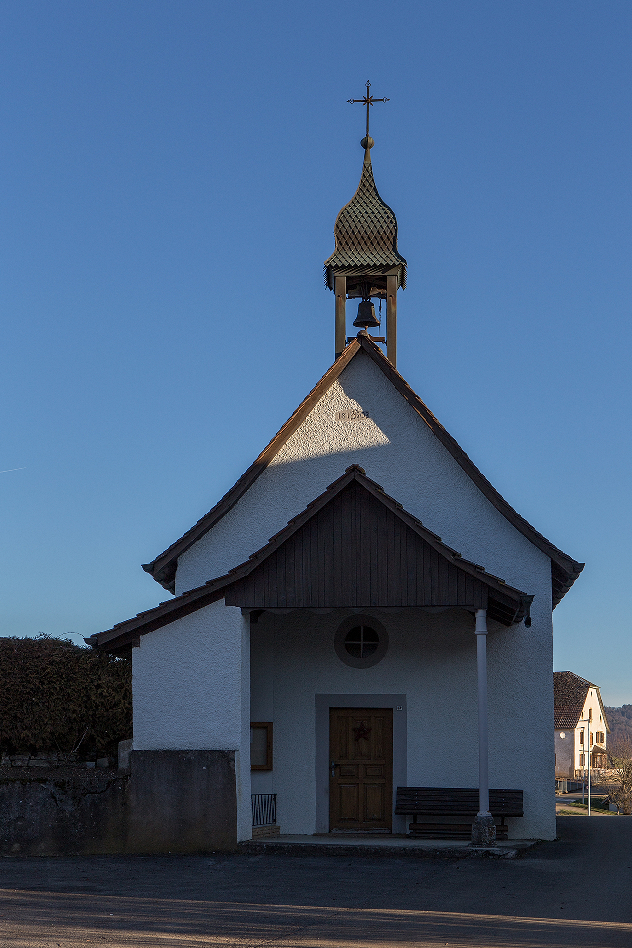 Kapelle in Montenol (JU)